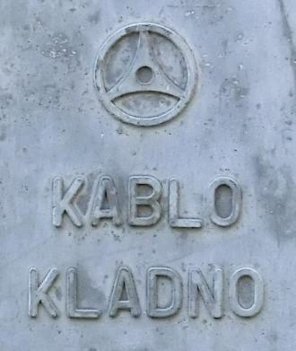 Koncernový logotyp KABLO, sériově lisovaný na plastové skříňce telefonní přípojky (vyrobil závod KABLO Kolín).